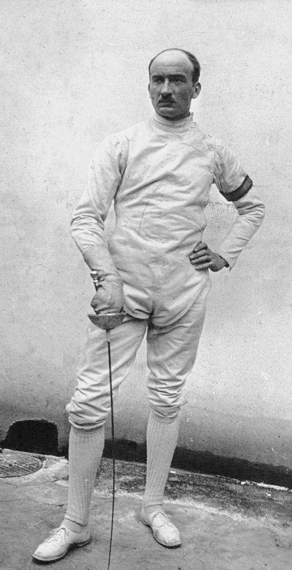 Finale des championnats de France de fleuret : Tainturier, portrait à 3 m. : photographie de presse